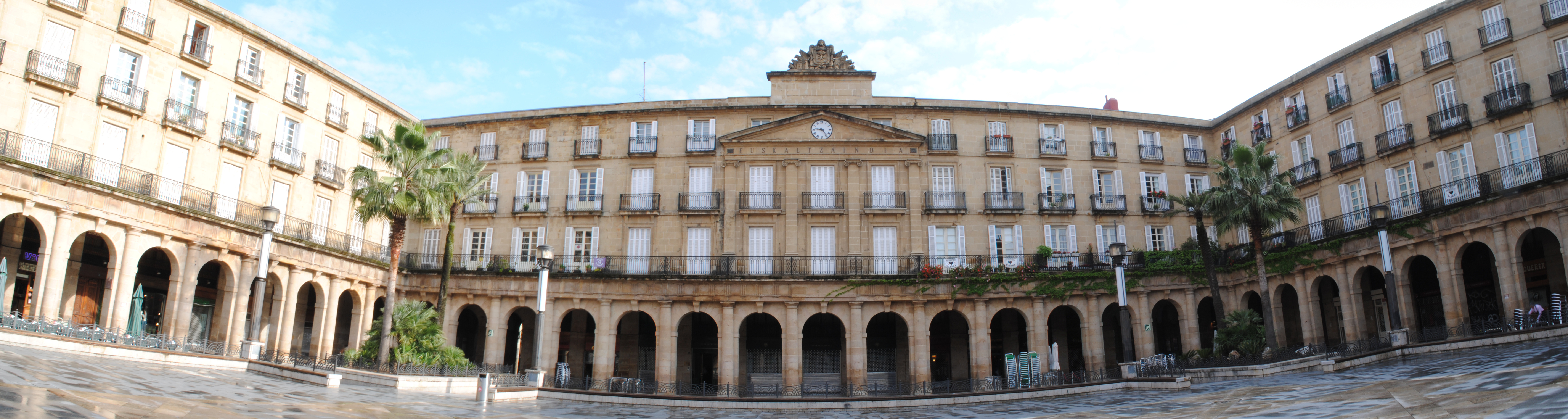 Bilboko Plaza Barriko zati baten ikuspegia. Bertan, Euskaltzaindiaren Egoitza nagusia ageri da erdian.